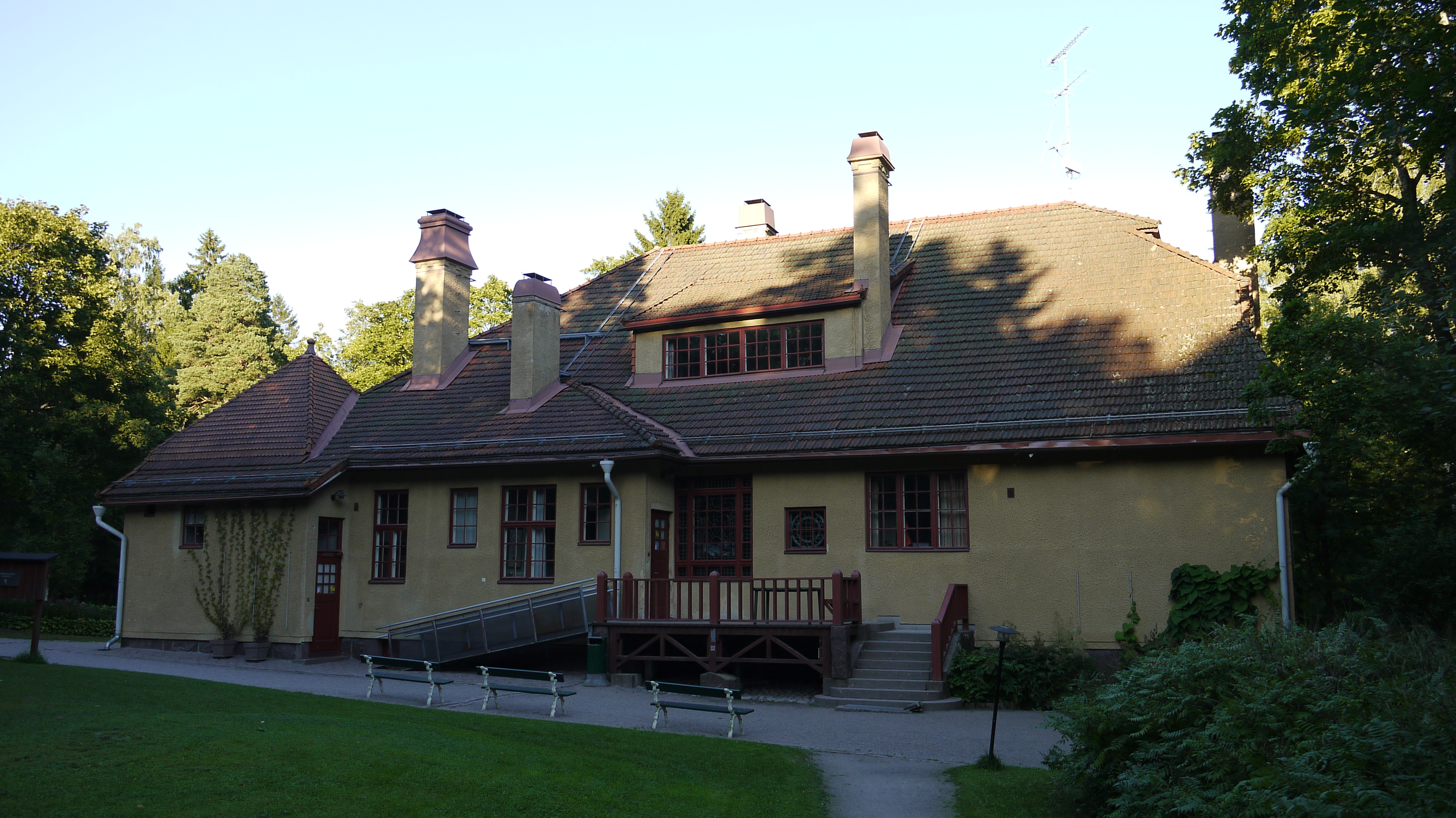 Villa Elfvik